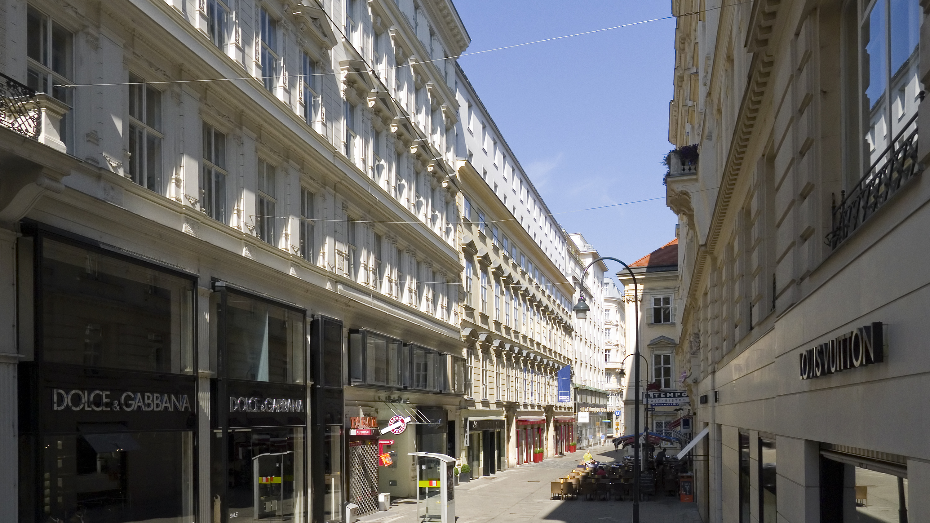 Wallnerstraße in Wien 1 bei Nr. 2 Richtung Nordwesten